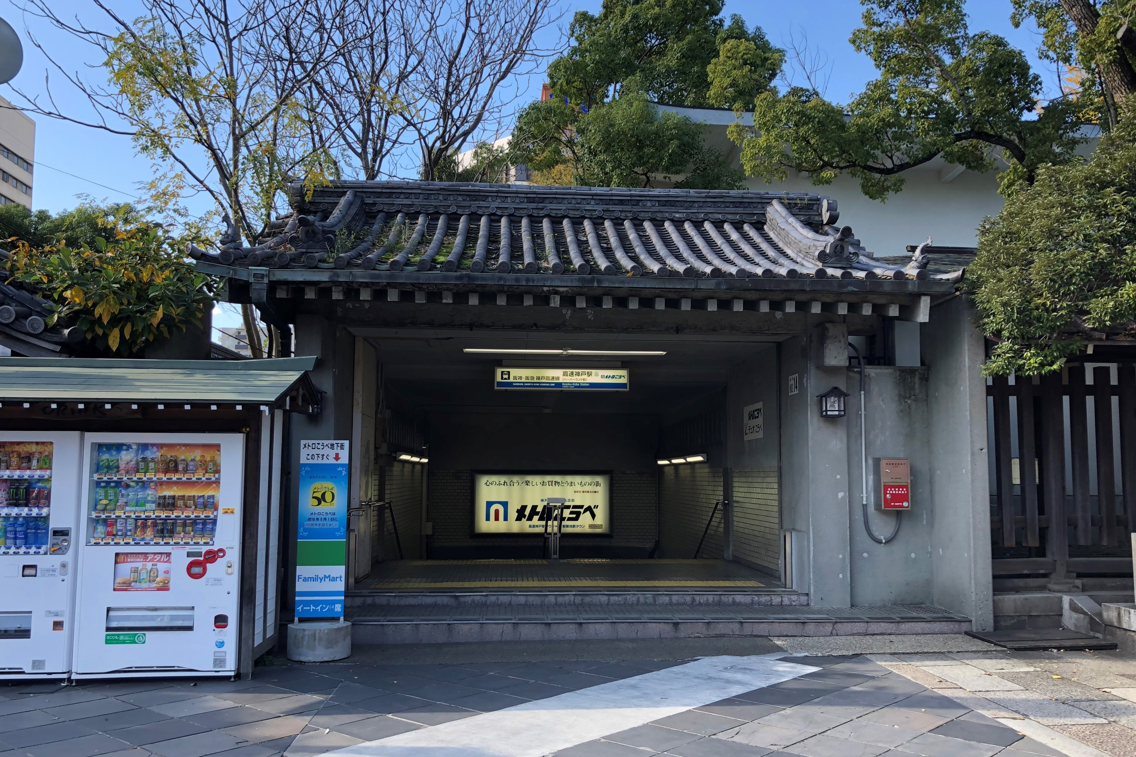 高速神戸駅東口